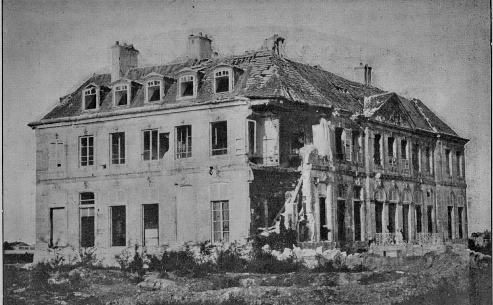 Le Château de Stains (Seine-Saint-Denis, France), après la Guerre franco-allemande de 1870